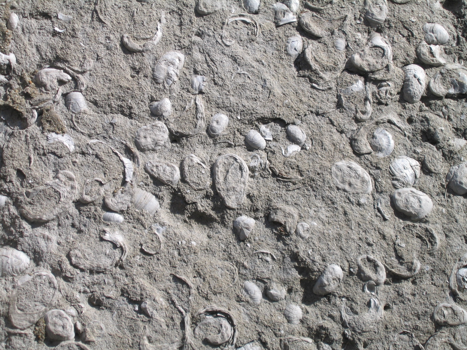 Mur en calcaire à gryphées dans la région lyonnaise (à Oullins). Issu des carrières des Monts d'Or. Photo Serged (Juillet 2005)